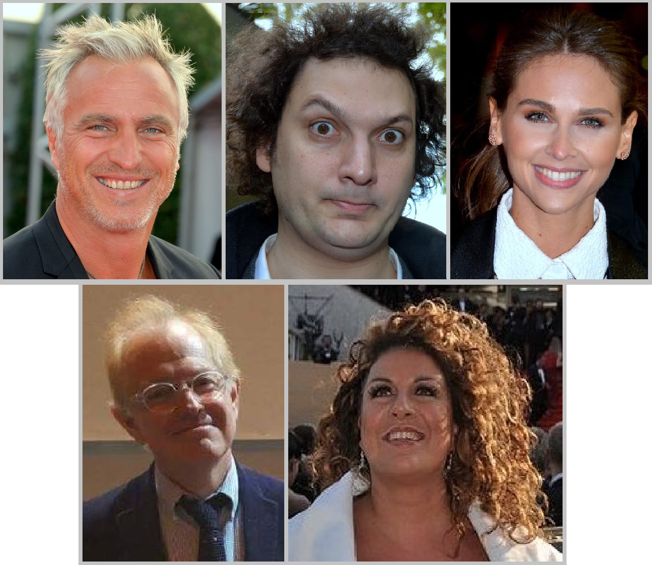 Photomontage de célébrités, commis lors de la 7e émission de la Saison 9 de Top Chef. Images provenant de Commons, seulement croppés et redimensionnés (liens vers les images originales :File:David Ginola Deauville 2014 2.jpg, File:Ophélie Meunier César 2016.jpg, File:Avec mac lesggy (cropped).jpeg, File:Marianne James.jpg, File:Eric Antoine 2013.jpg)